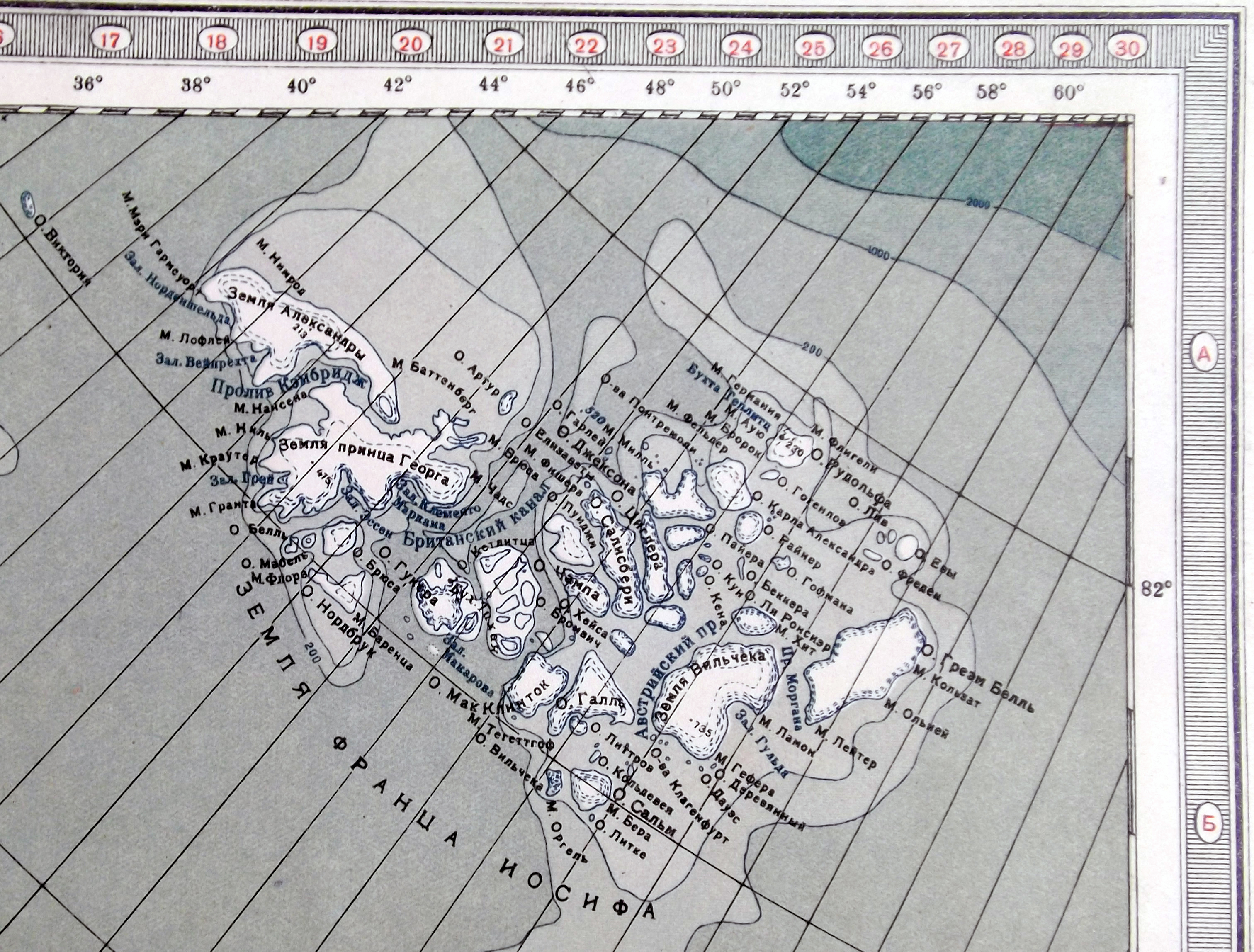 Атлас командира РККА. Издание 7-го отдела генерального штаба РККА